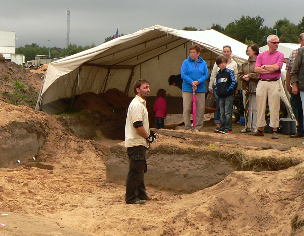 Ausgrabung im Gewerbegebiet Lemke bei öffentlicher Führung durch Tobias Scholz